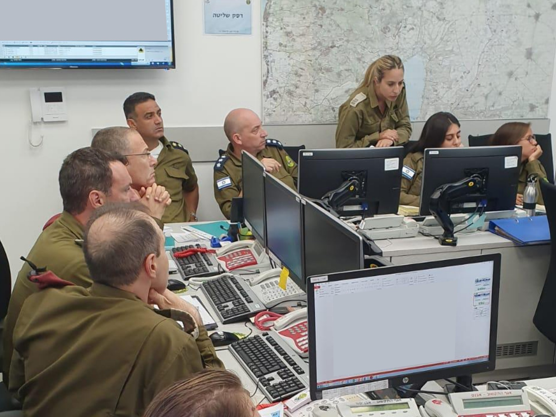 חמ"ל קשרי החוץ